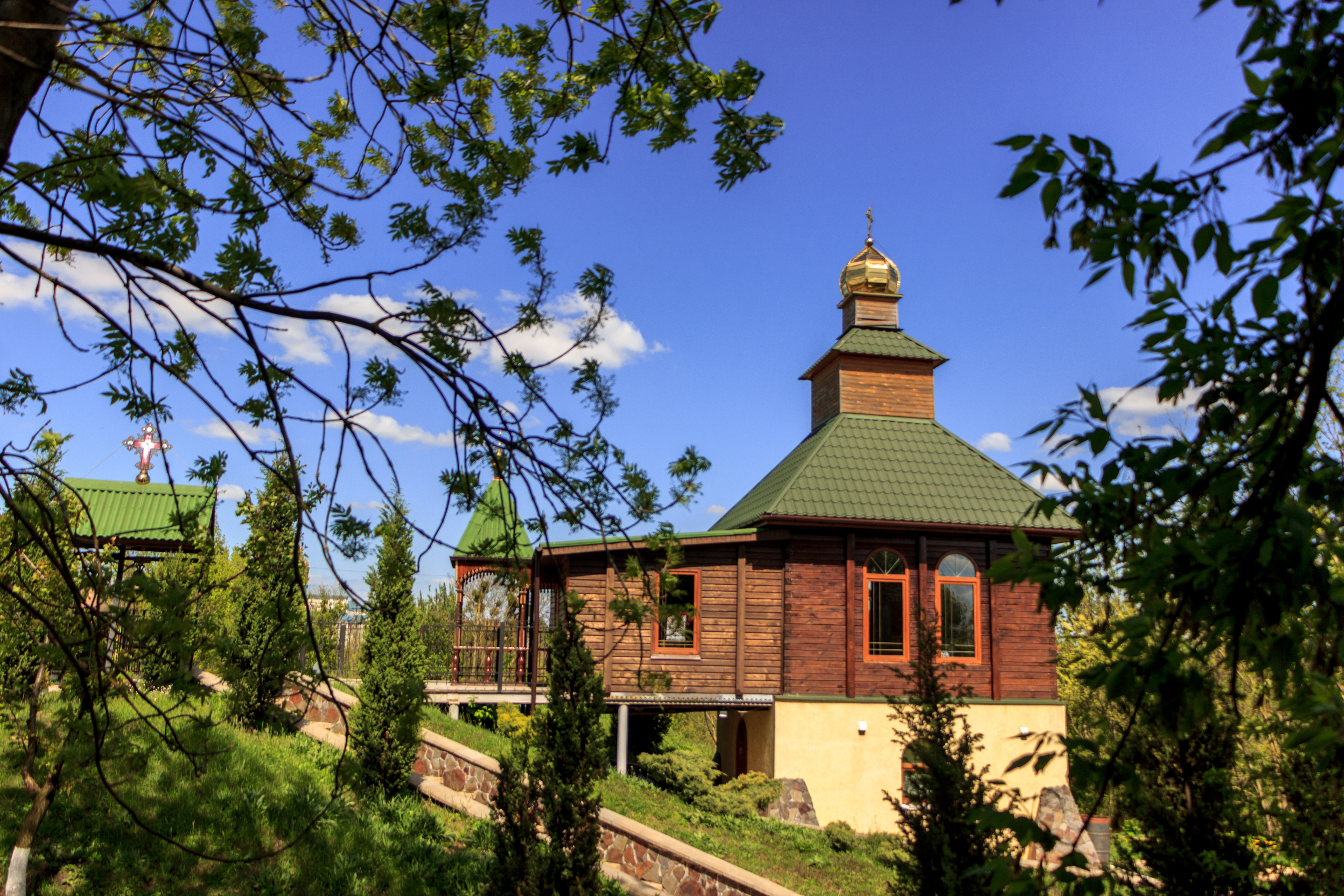 Центральний храм